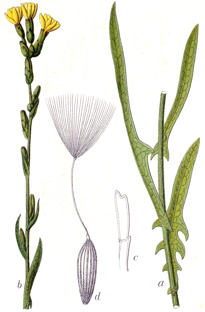 Lactuca saligna L. Original Caption Weidenblättrige Lattich, Lactuca saligna